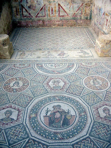 Villa Romana del Casale, Piazza Armerina, Sicily/Sicilia, Italy/Italien